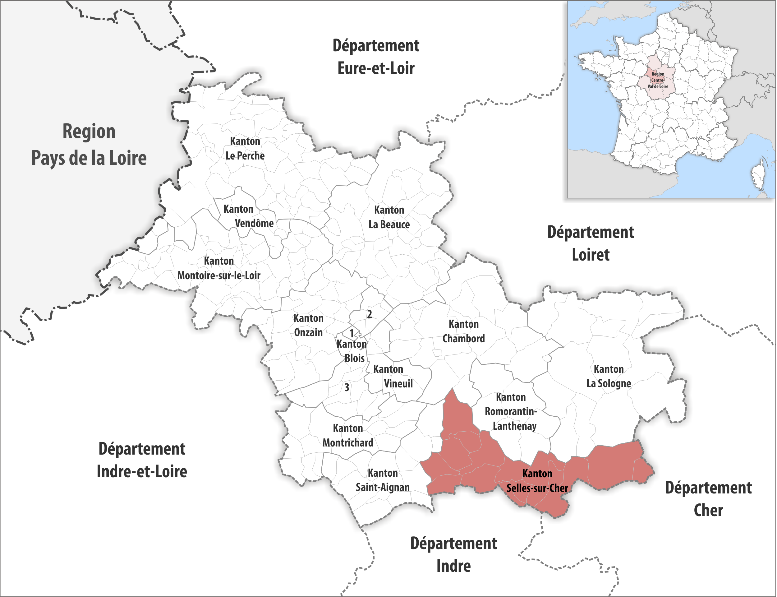 Lage des Kantons Selles-sur-Cher